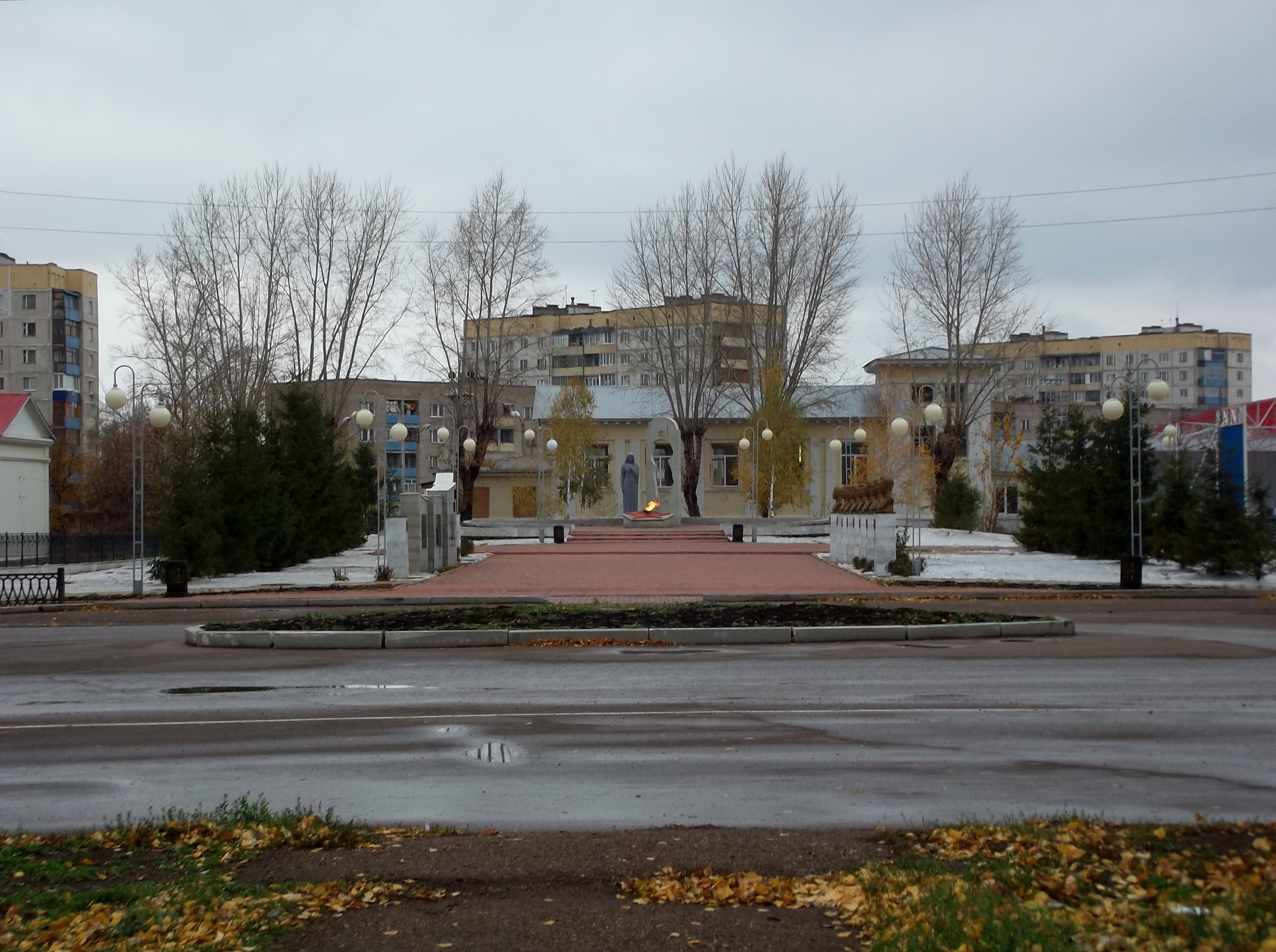 Мемориальный комплекс "Аллея героев" в городе Ишимбае